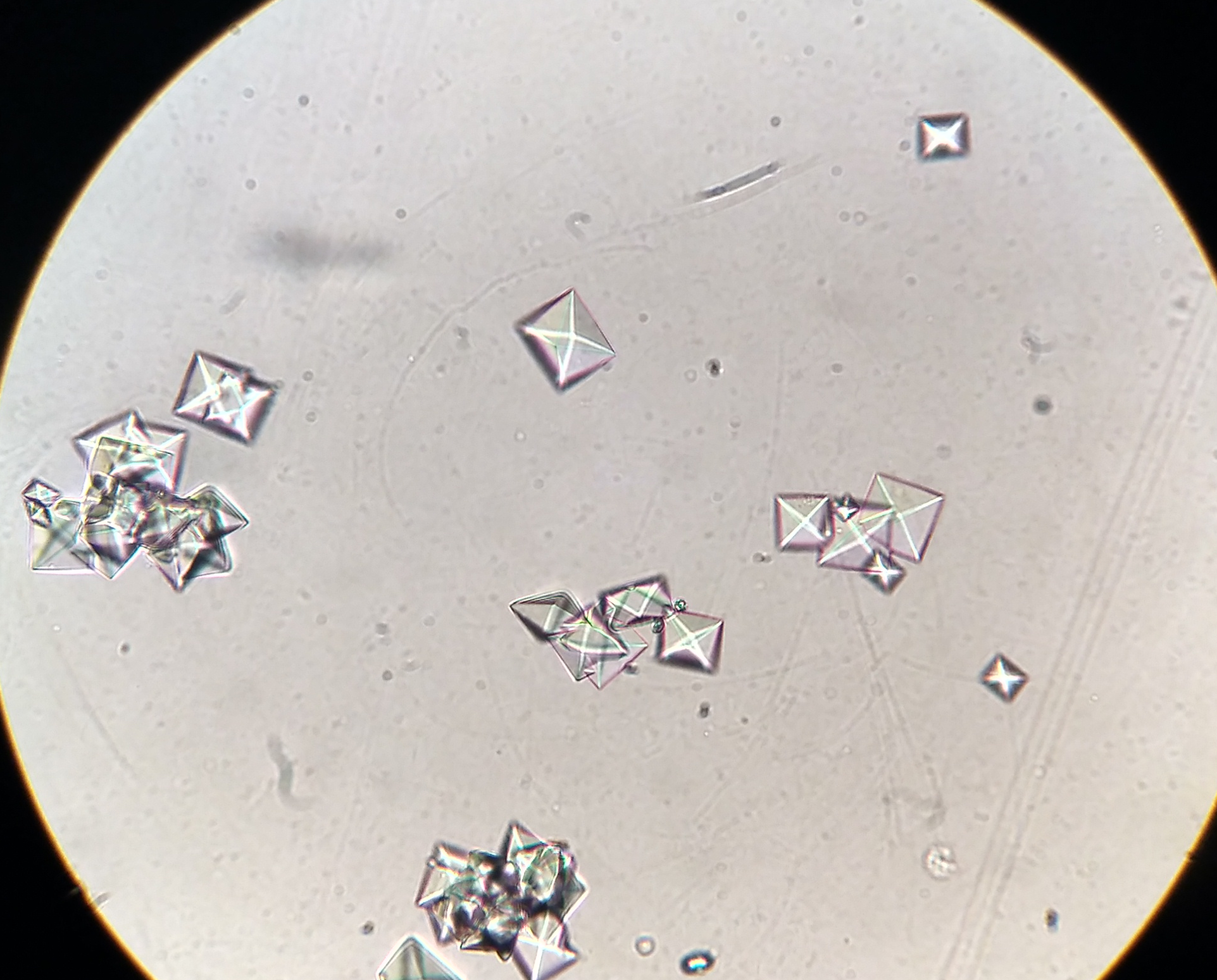 Detalle, sedimento urinario mostrando frecuentes cristales de oxalato de calcio. 40x